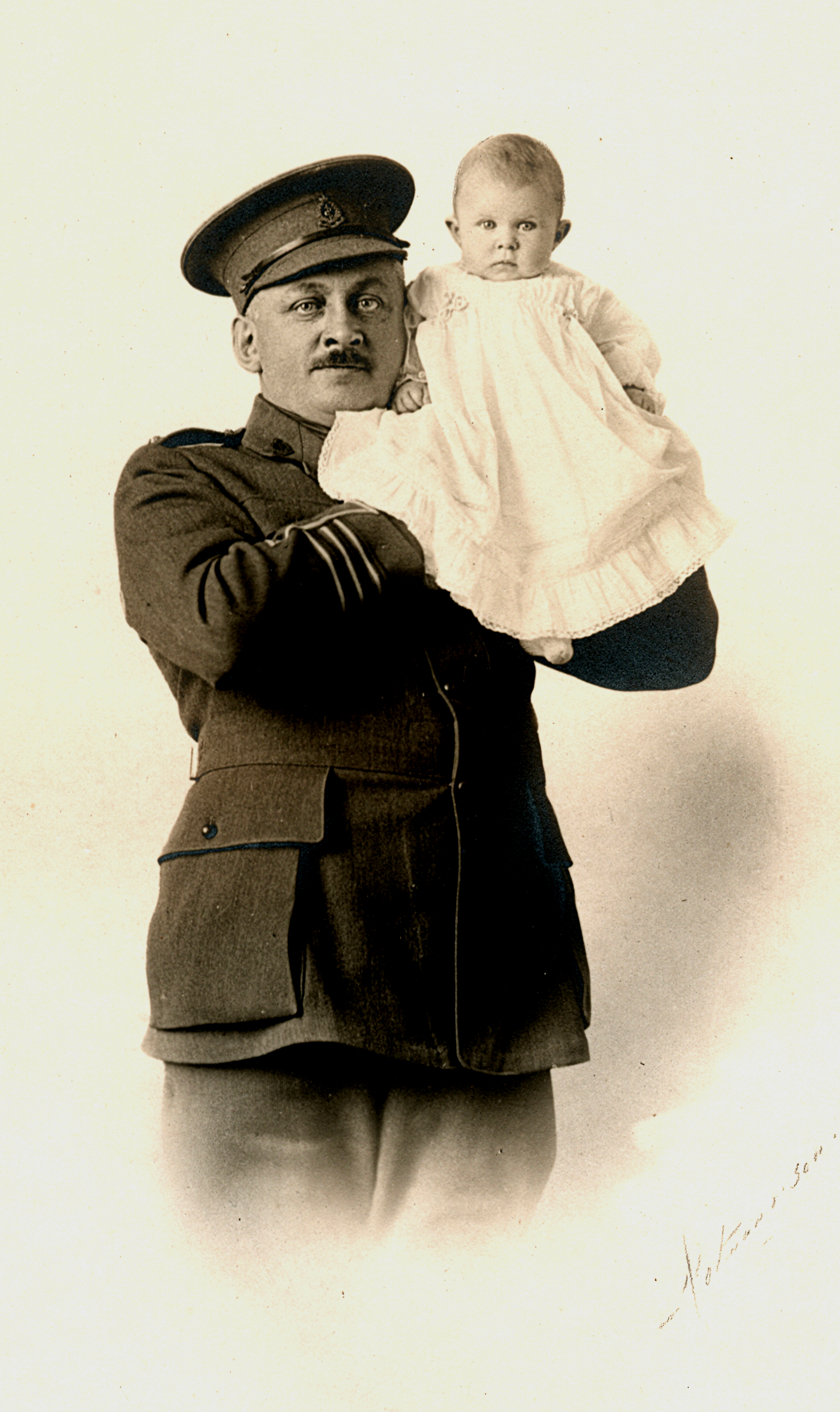 Le colonel Arthur Mignault et sa fille Valérie en avril 1915.